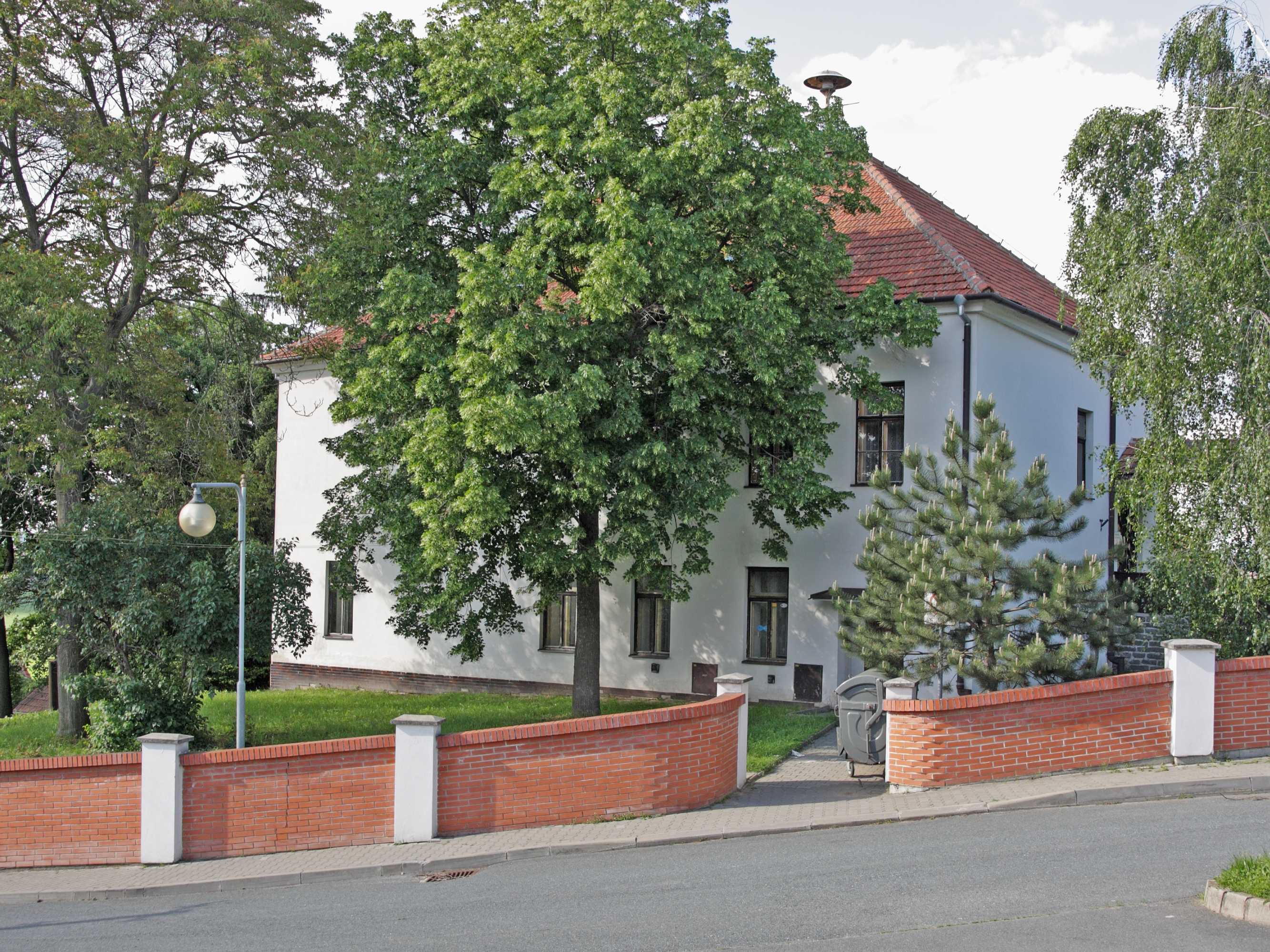 Rebešovice - bývalý zámeček.